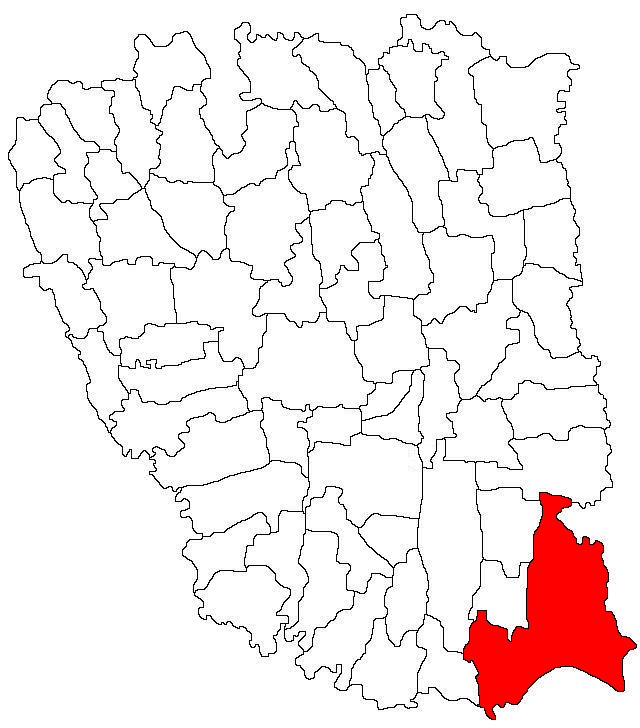 Categorie:Hărţi ale judeţului Galaţi